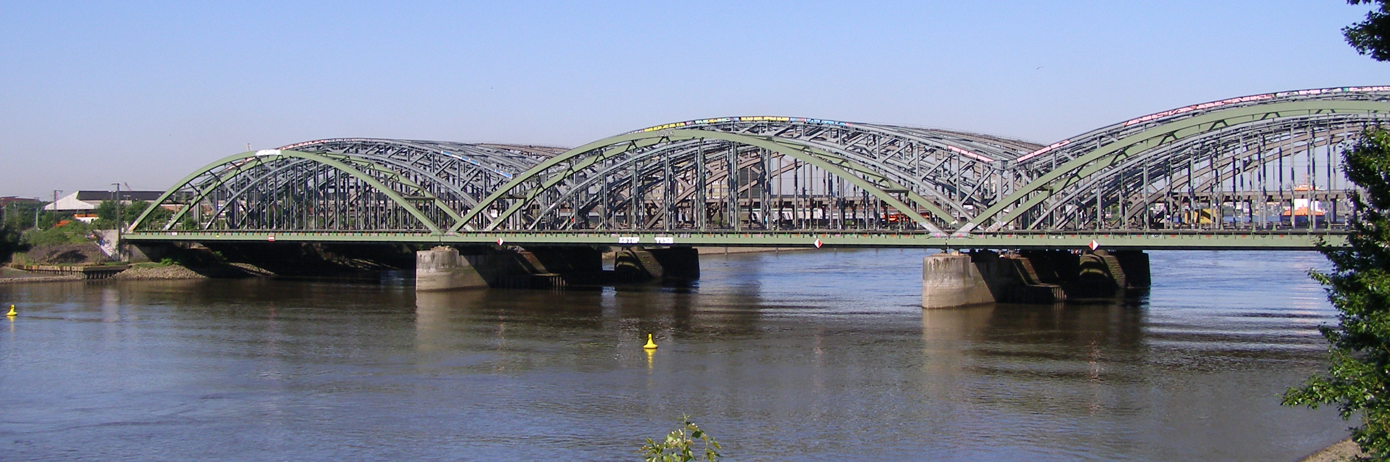 Blick von der Neuen Elbbrücke auf die Eisenbahn-Elbbrücke über die Norderelbe. Die grünen Brückenbögen gehören zu den S-Bahn-Gleisen, und im Hintergrund schließt sich die Freihafenbrücke an.